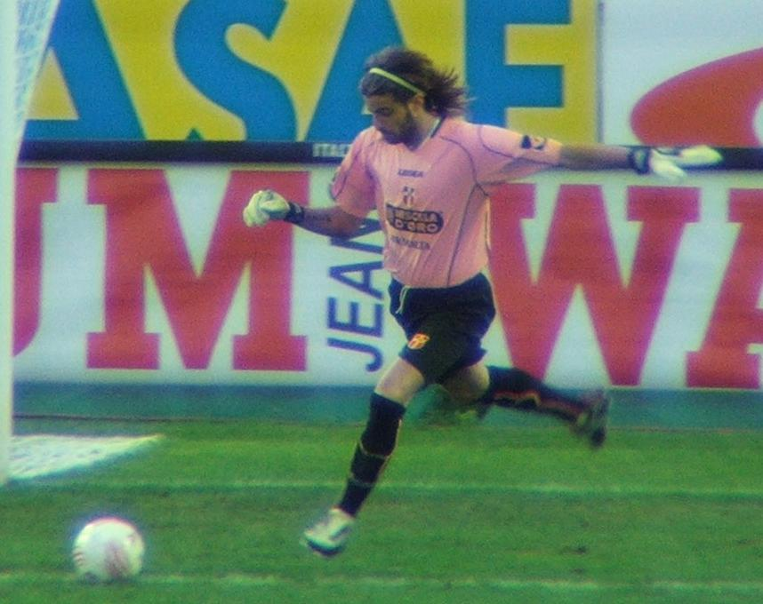 Storari in Messina-Inter campionato 2005-2006 27-11-2005